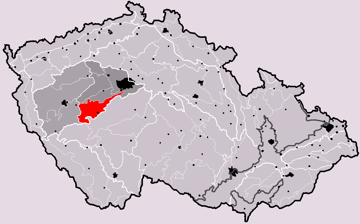 Poloha geomorfologického celku Brdská vrchovina v rámci České republiky. Hercynský systém Hercynská pohoří I Česká vysočina I5 (V) Poberounská subprovincie I5A (VA) Brdská oblast I5A-5 (VA-5) Brdská vrchovina